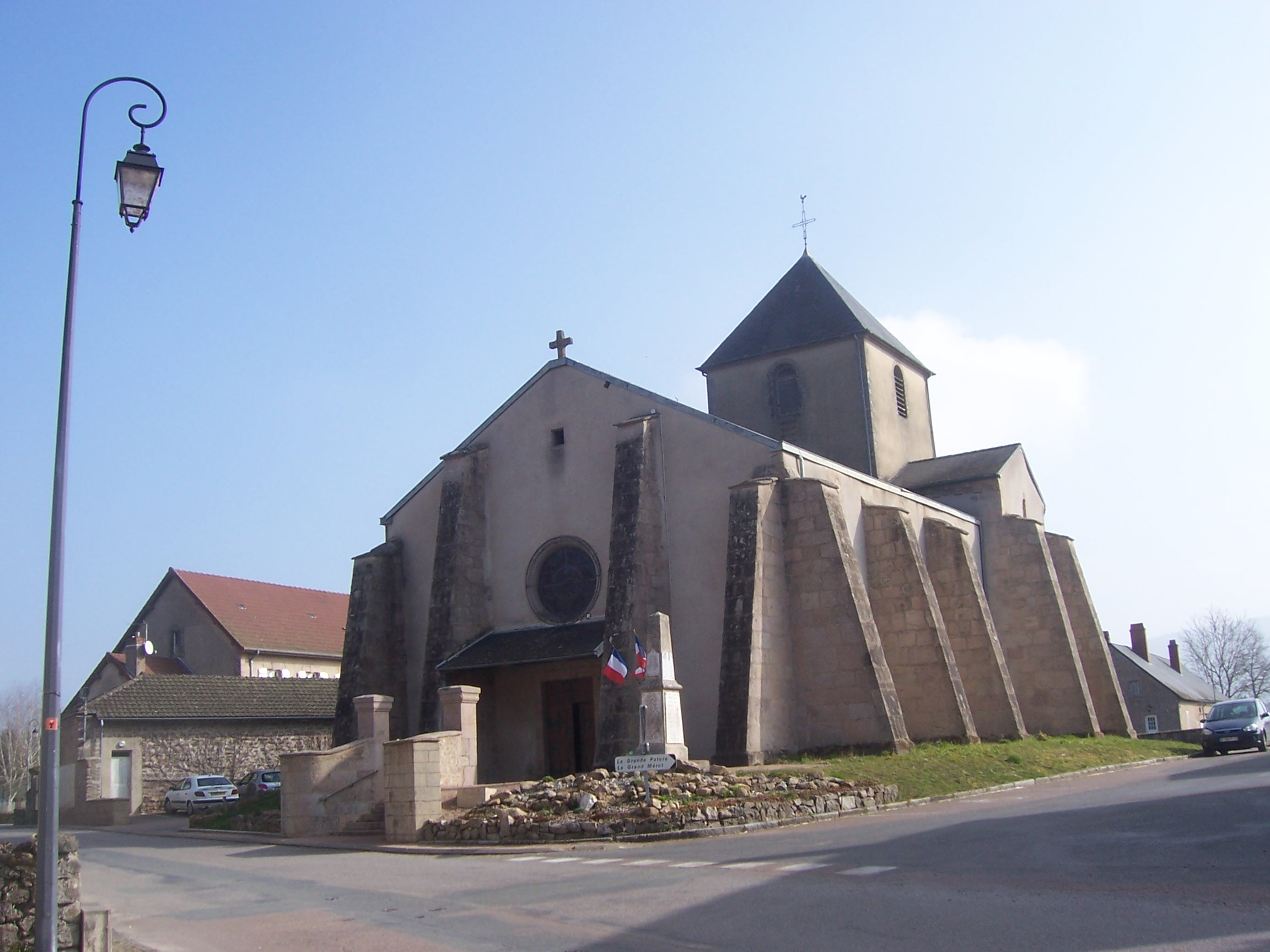 Eglise de Laizy